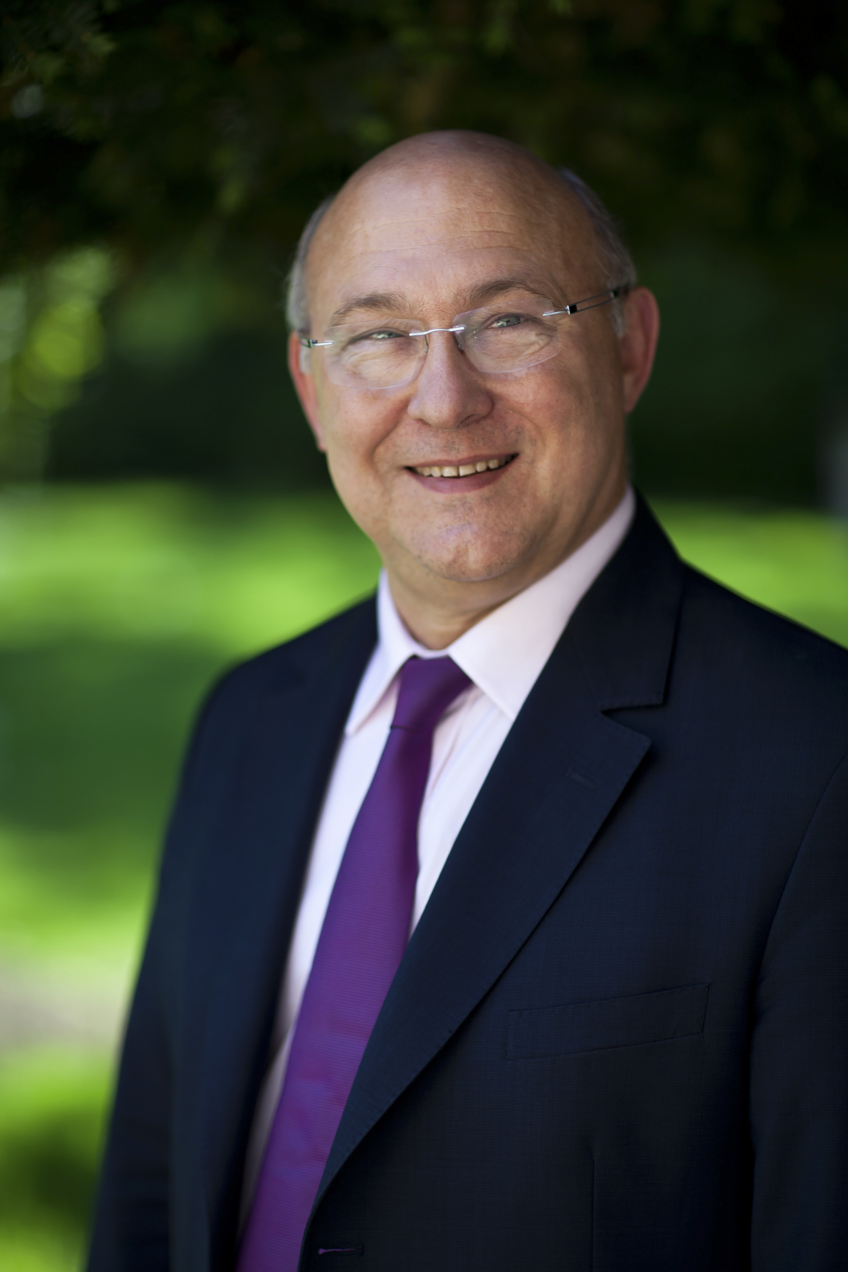 Portrait du ministre du Travail, de l'Emploi, de la Formation professionnelle et du Dialogue social